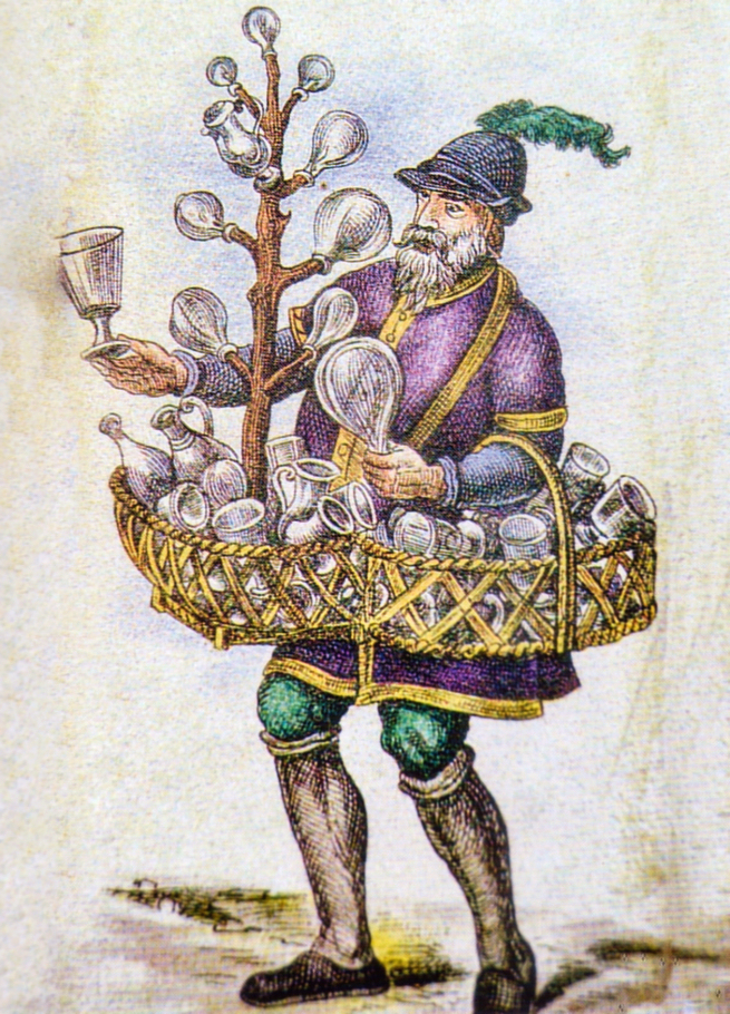 Glasverkäufer